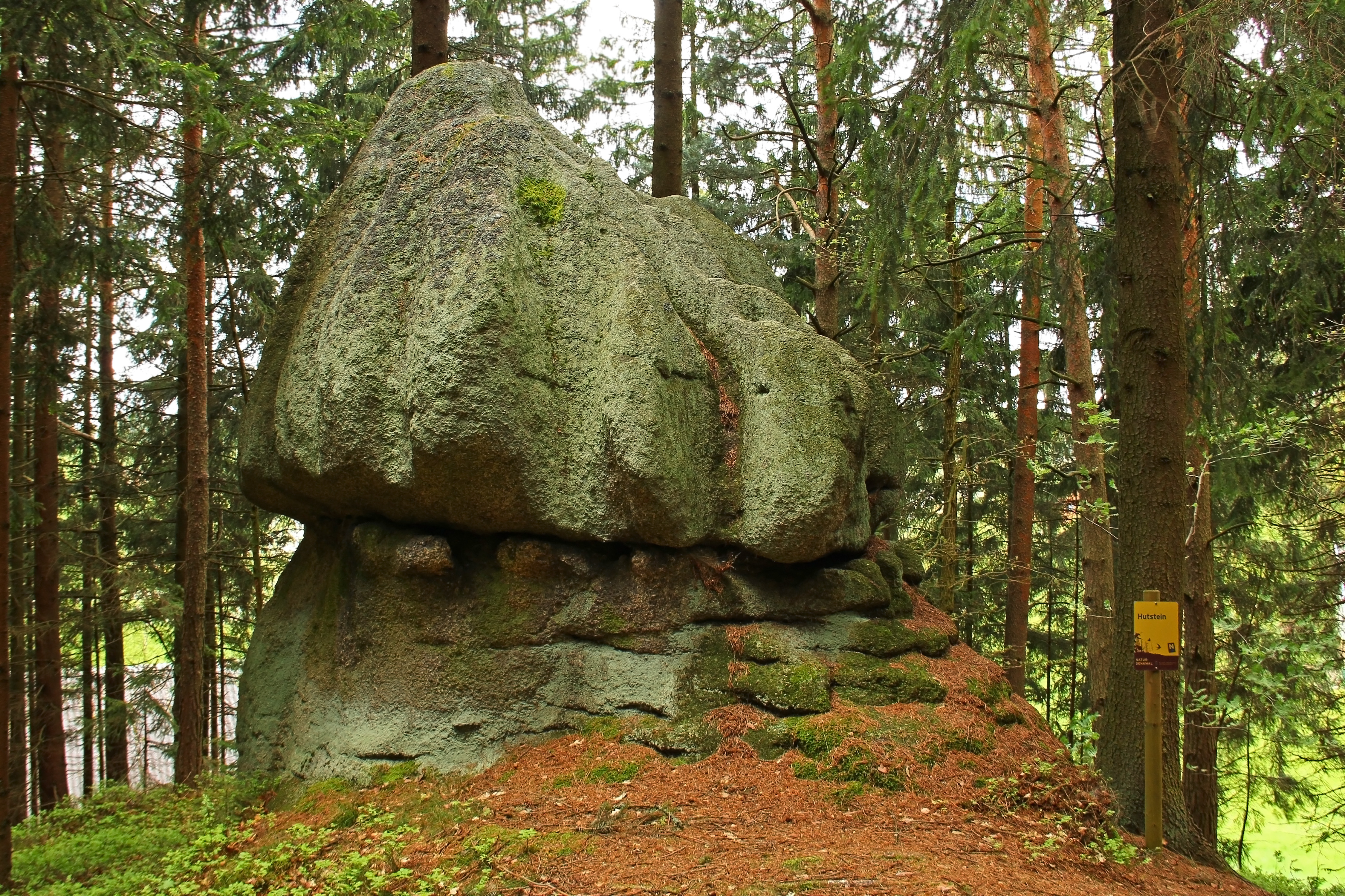 Der Hutstein bei Haugschlag ist ca 4 Meter hoch und hat einen Durchmesser von ca 2,20 Meter. Er hat etliche, von der Kuppe nach unten verlaufende Verwitterungsrillen und wurde 1962 zum Naturdenkmal erklärt. This media shows the natural monument in Lower Austria with the ID GD-054.